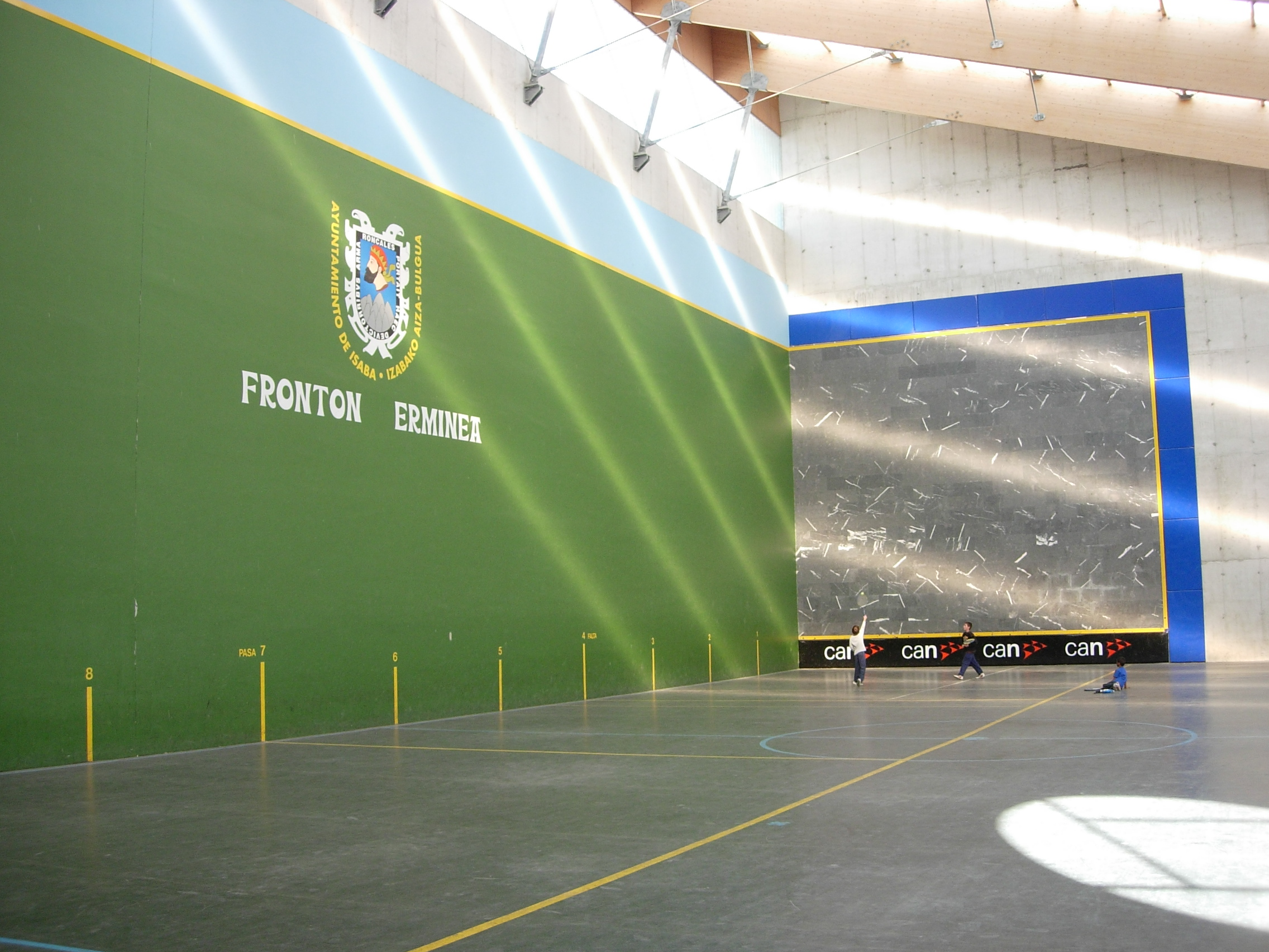 La foto la he realizado yo mismo el 5 de octubre de 2005 y es el frontón Erminea de Isaba